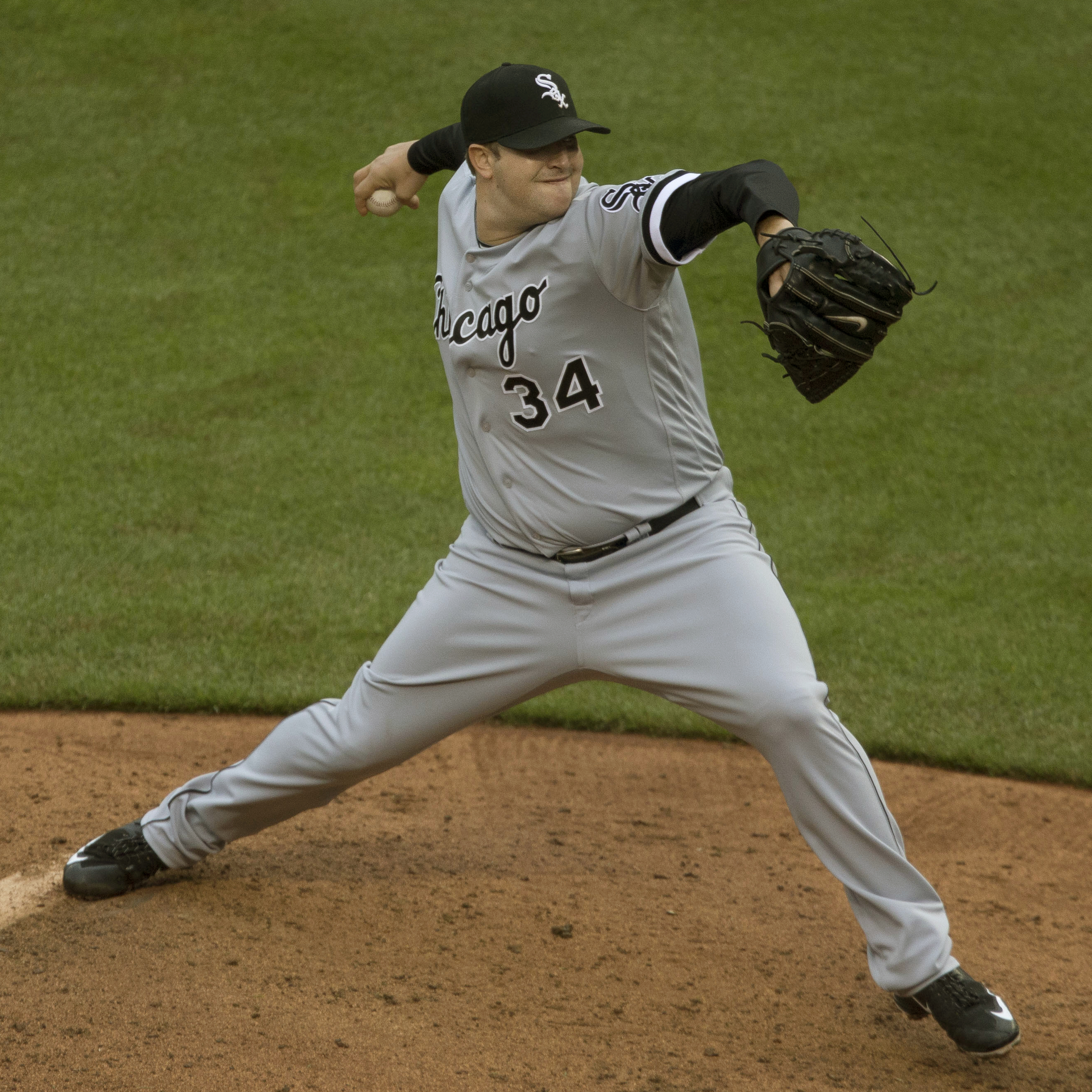 Matt Albers